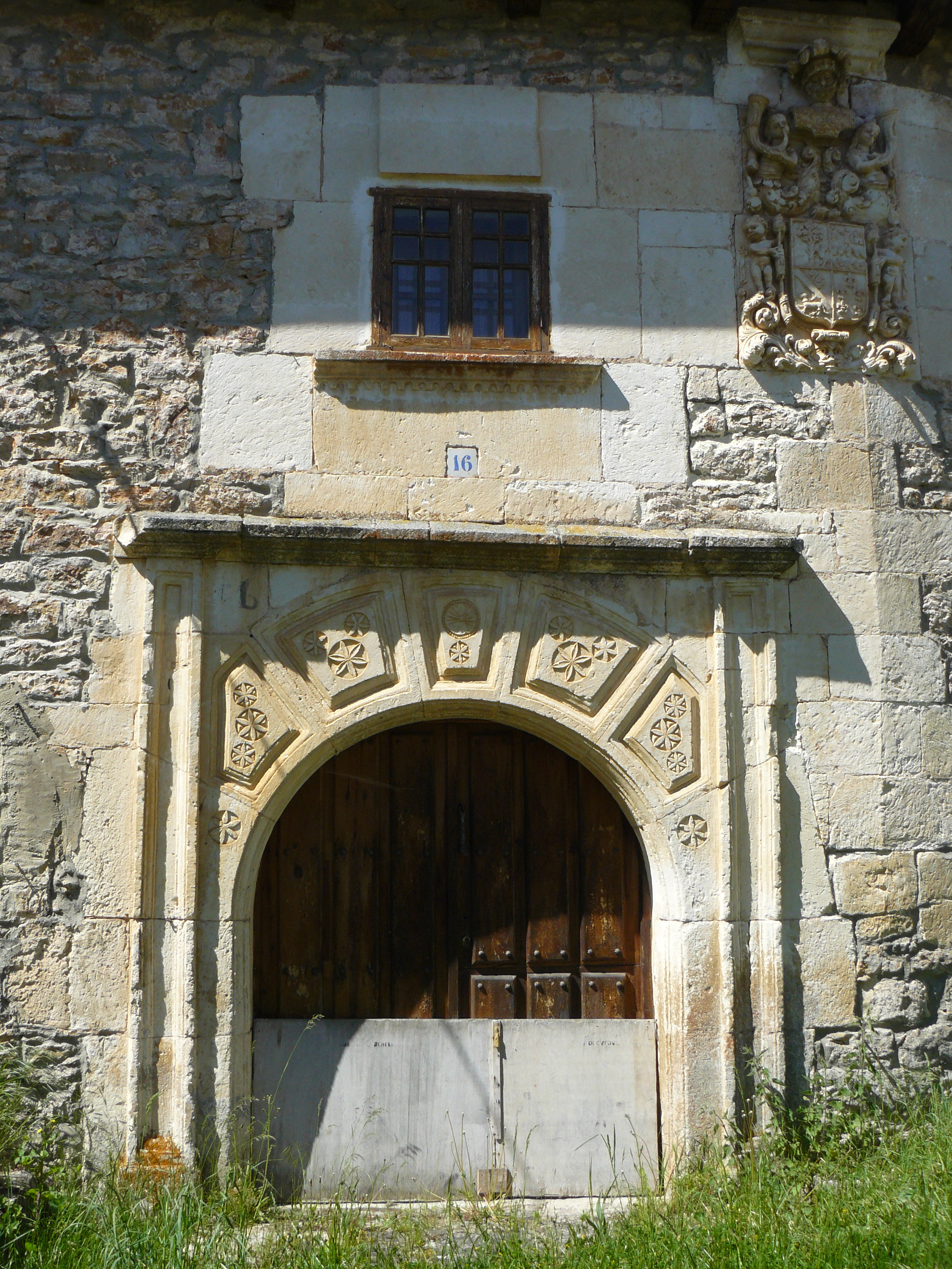 Turzo, Burgos.